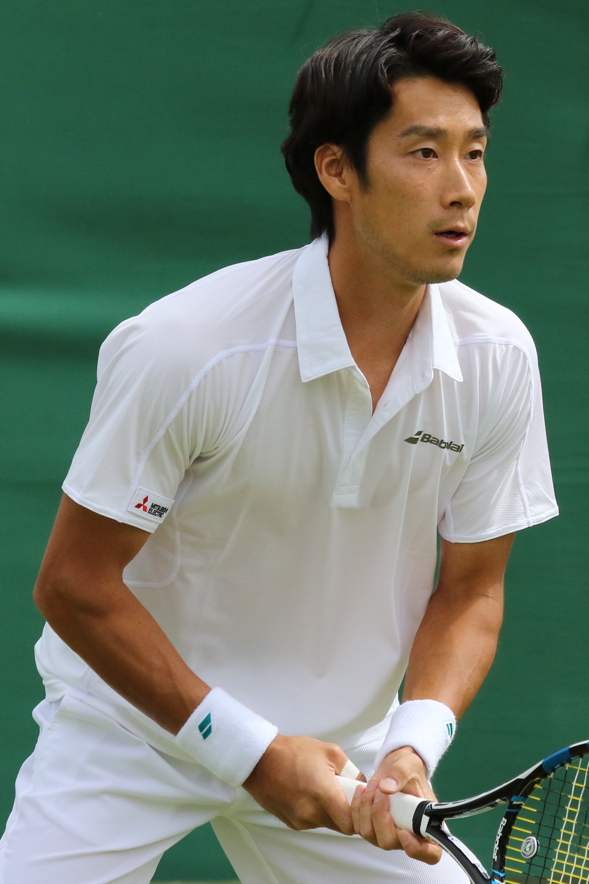 Sugita WMQ16 (5)